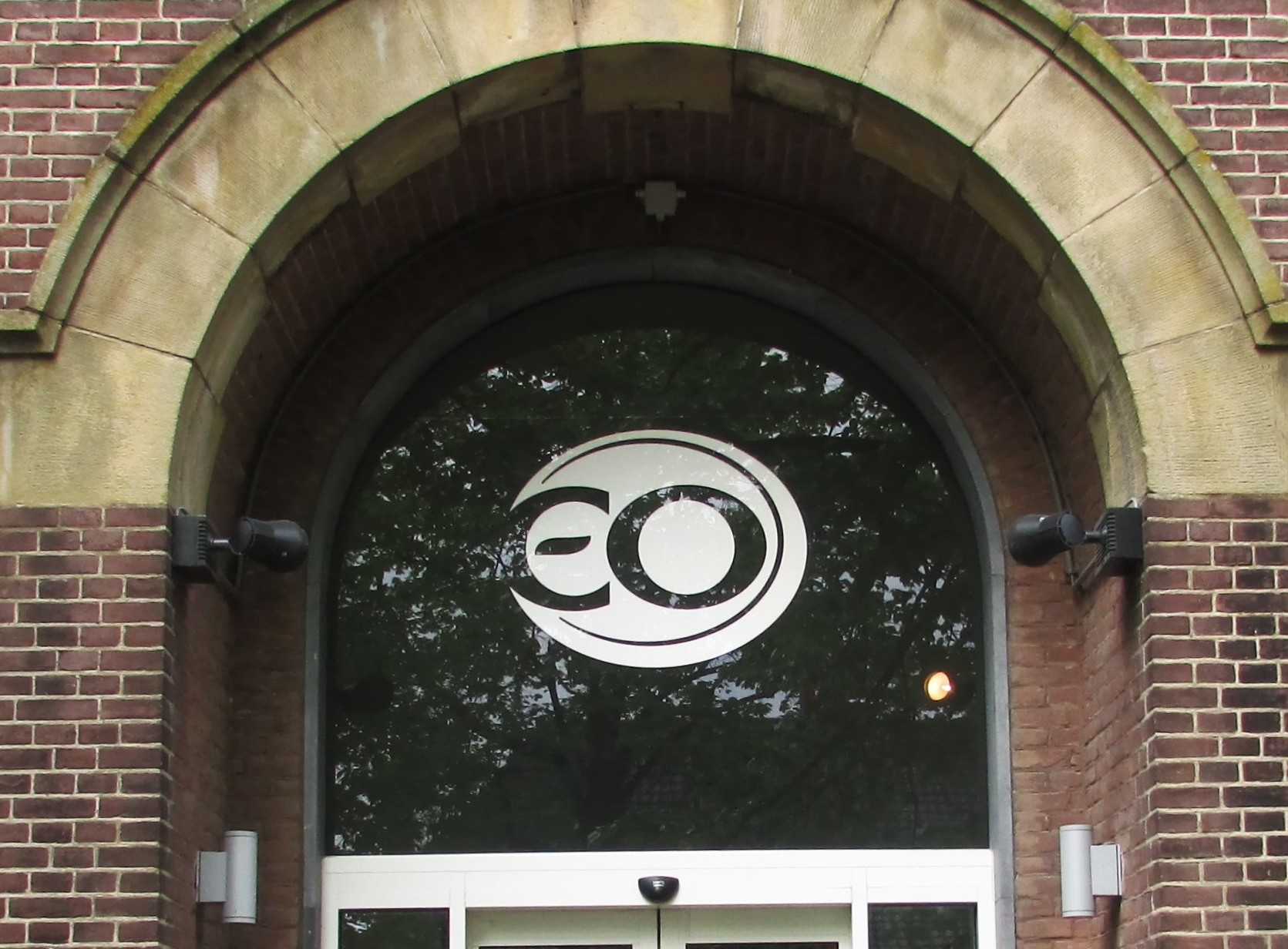 Entree van de Evangelische Omroep op de Oude Amersfoortseweg 79. Gemeentelijk monument.